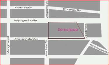 Die frühere Lage des Dönhoffplatzes auf einem Stadtplanausschnitt von 2005